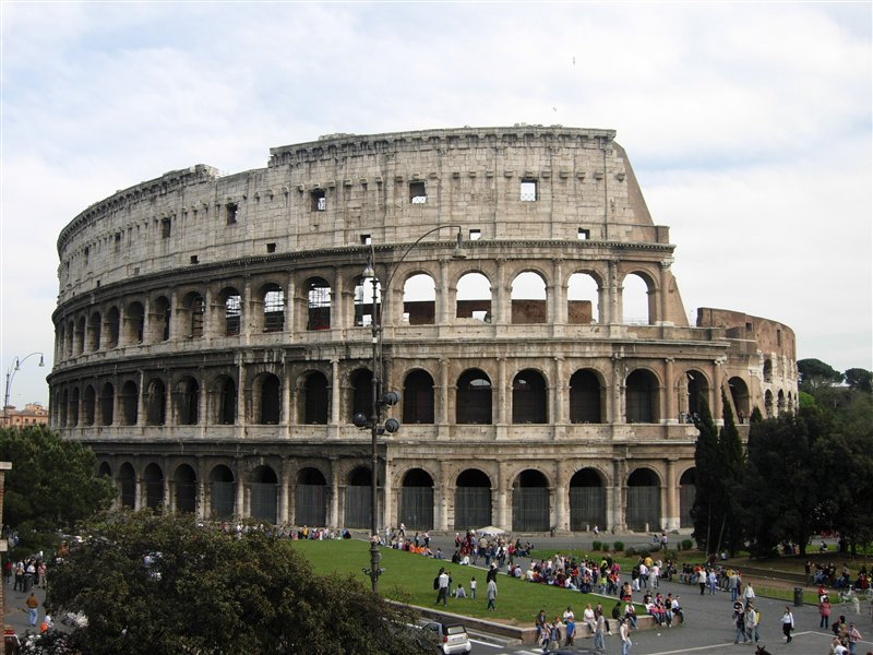 Rome Colosseum